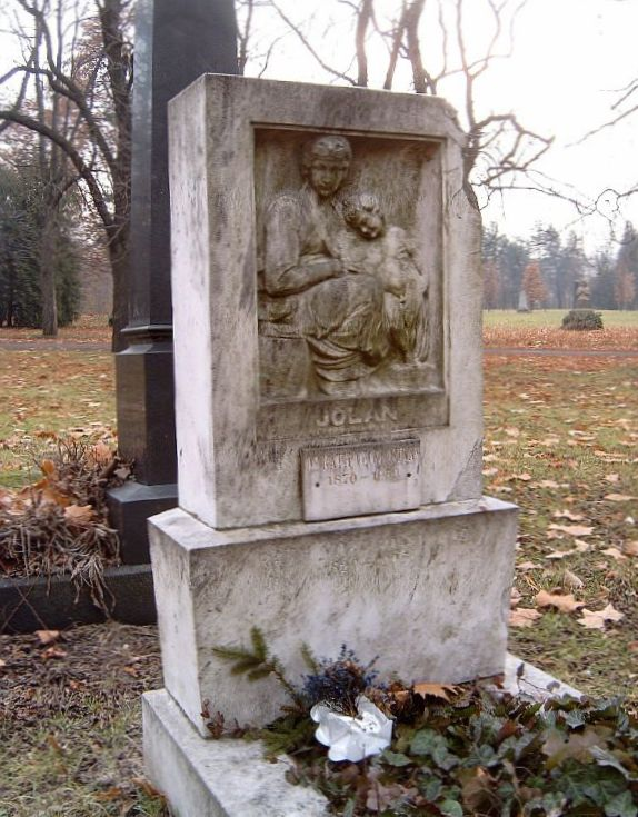 Ráth-Végh István (Bp., 1870. nov. 23. – Bp., 1959. dec. 18.): jogász, művelődéstörténeti szakíró és Ráth Mór (Szeged, 1829. jún. 29. – Bp., 1903. febr. 5.): könyvkereskedő és könyvkiadó, Ráth György és Ráth Károly (1838 – 1902) testvérének sírja Budapesten. Kerepesi temető: 29/1-1-29.